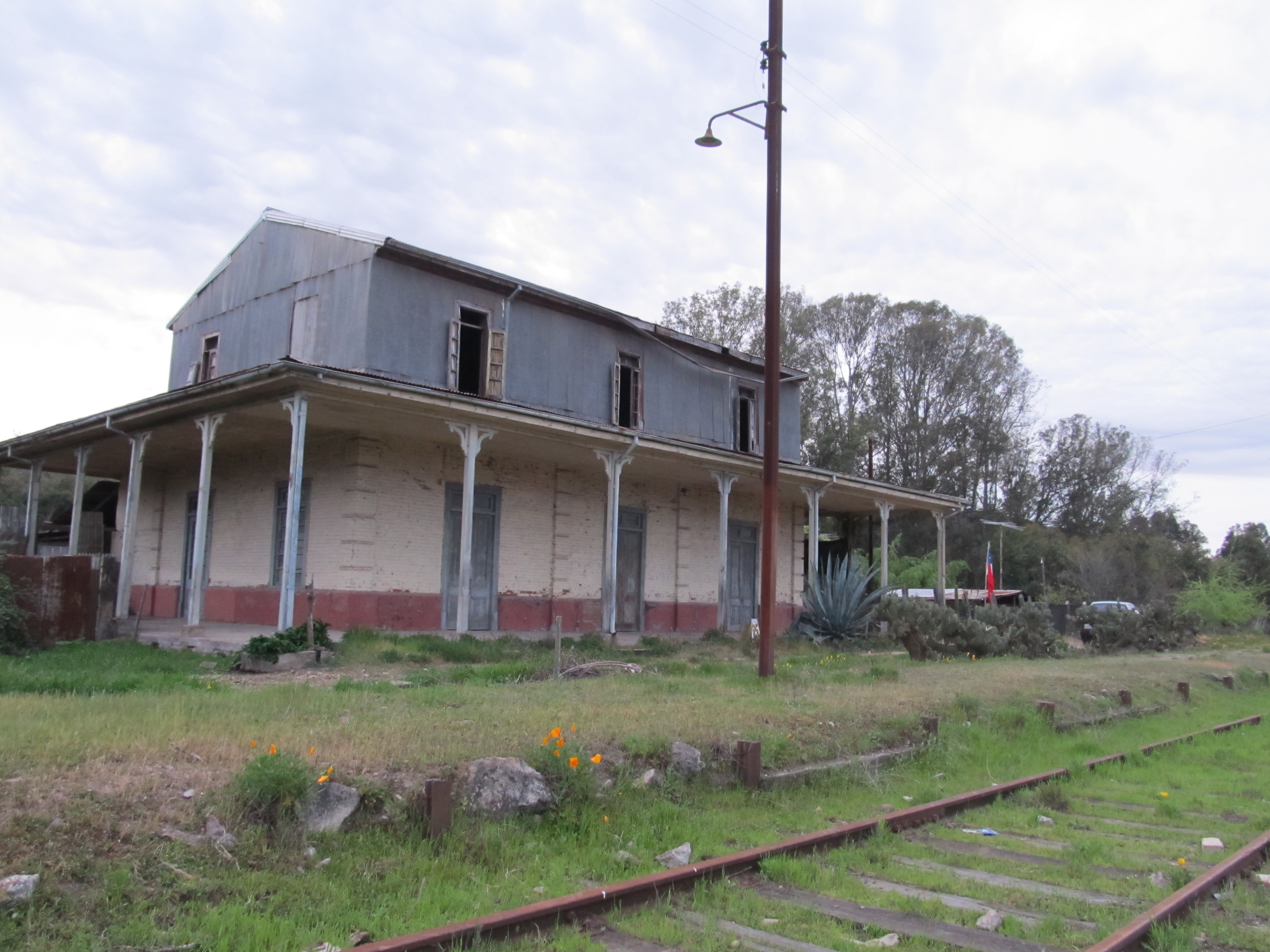 Estación de ferrocarriles de Colchagua This is a photo of a national monument in Chile: 371